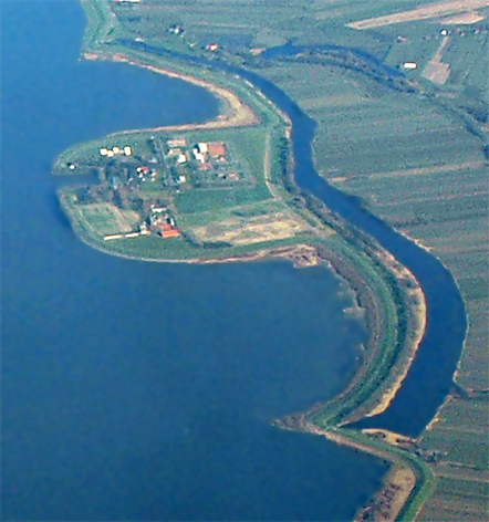 Hahnöfersand, eine Halbinsel in der Unterelbe bei Jork